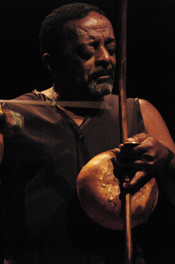 Espetáculo de inaguração do Auditório Ibirapuera. São Paulo. Brasil.